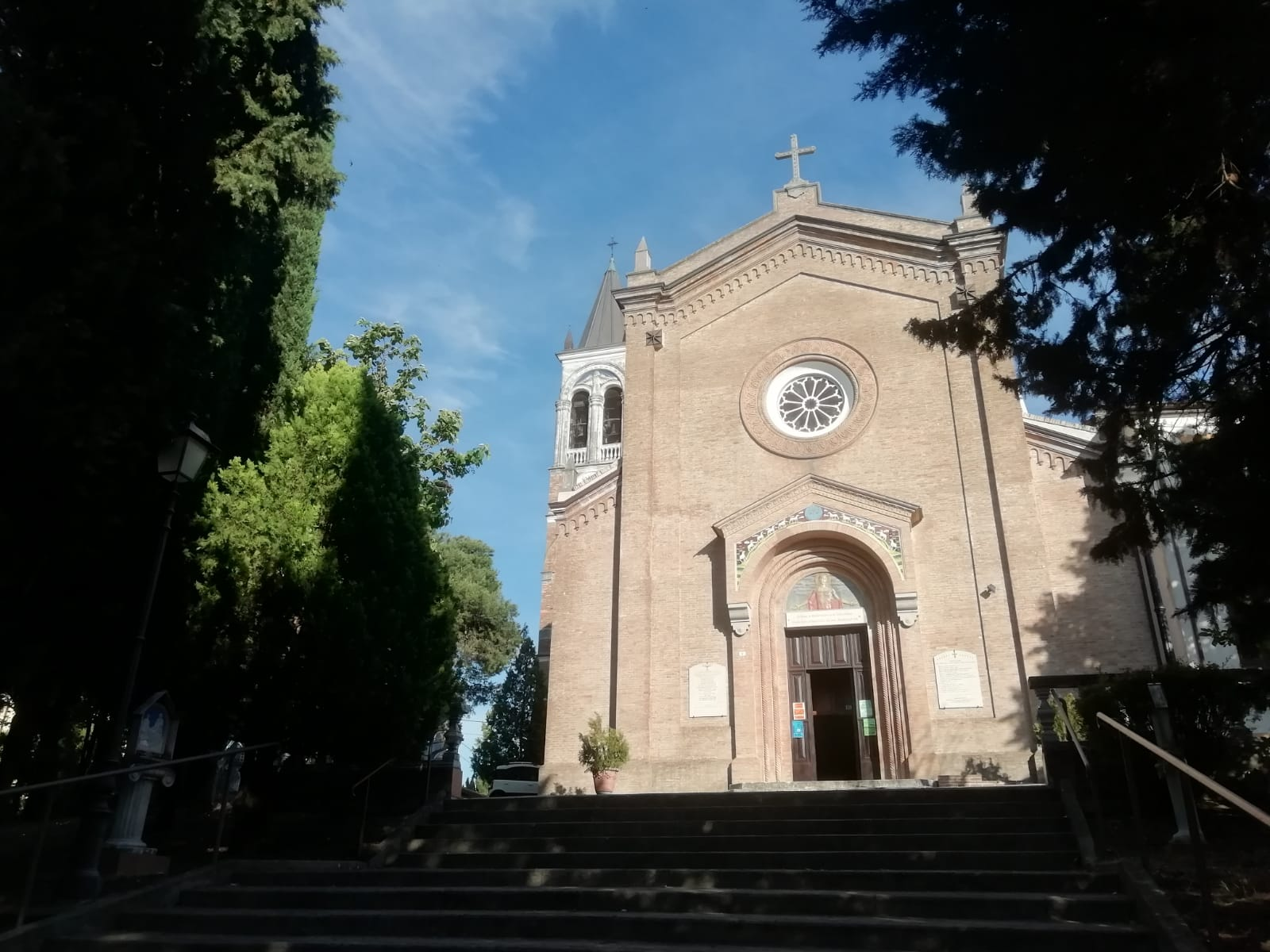 L'immagine rappresenta la chiesa vista dalla facciata anteriore, a pochi scalini in basso sulla scalinata che porta alla stessa.